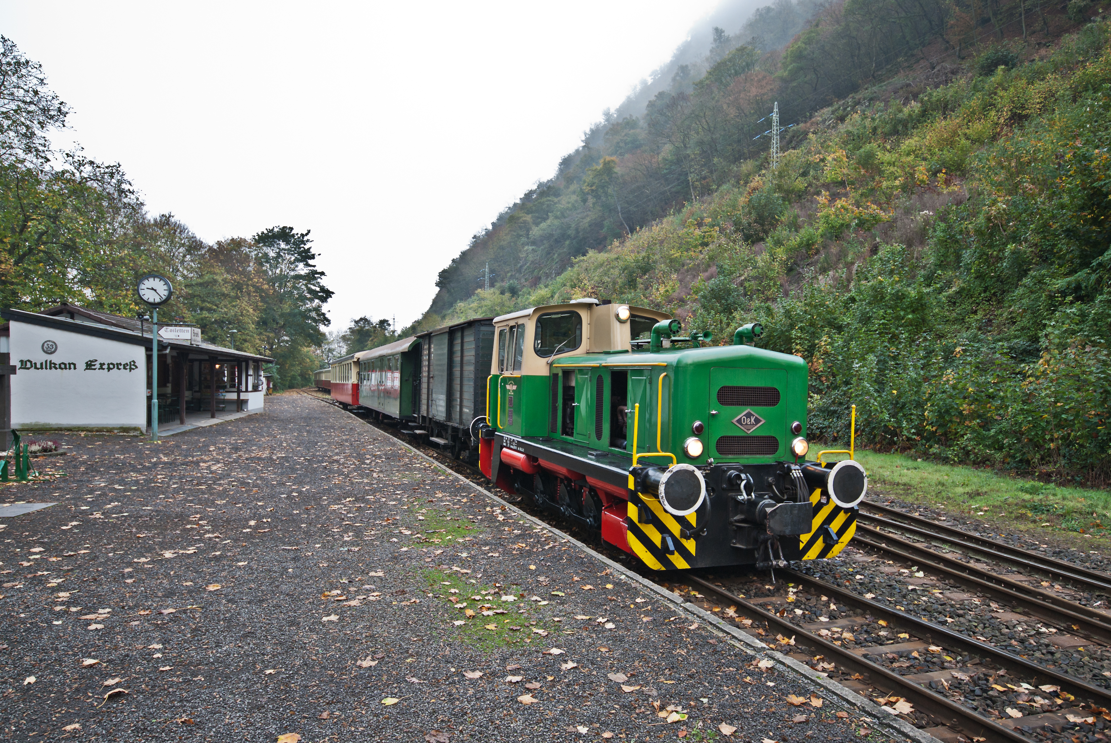 Brohltalbahn-Diesellok D1 wartet mit dem Vulkan-Express auf Abfahrt im Bahnhof Brohl-Lützing.